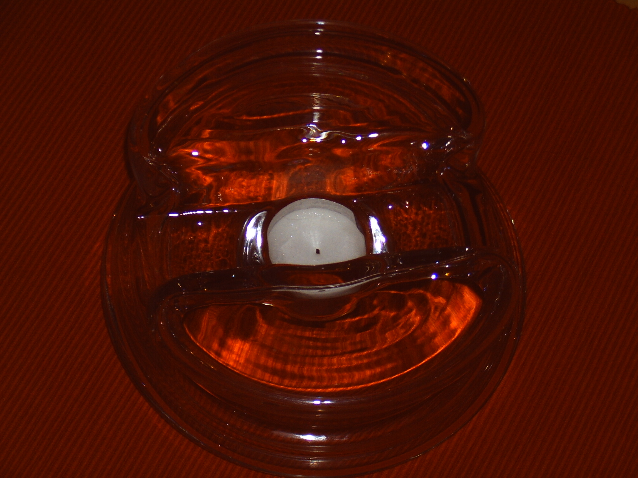 Ein Stövchen aus Glas.